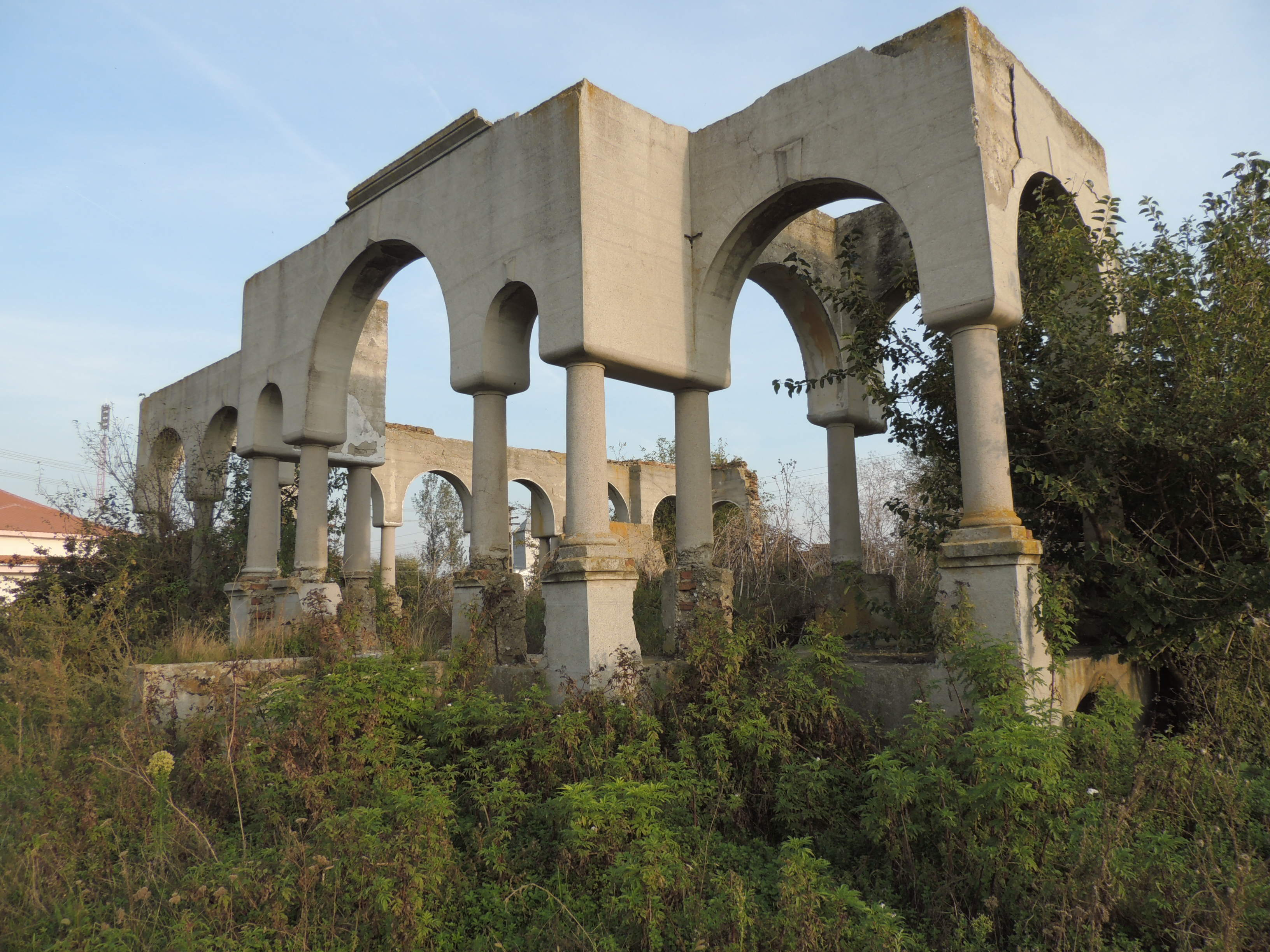 Fațada principală 01